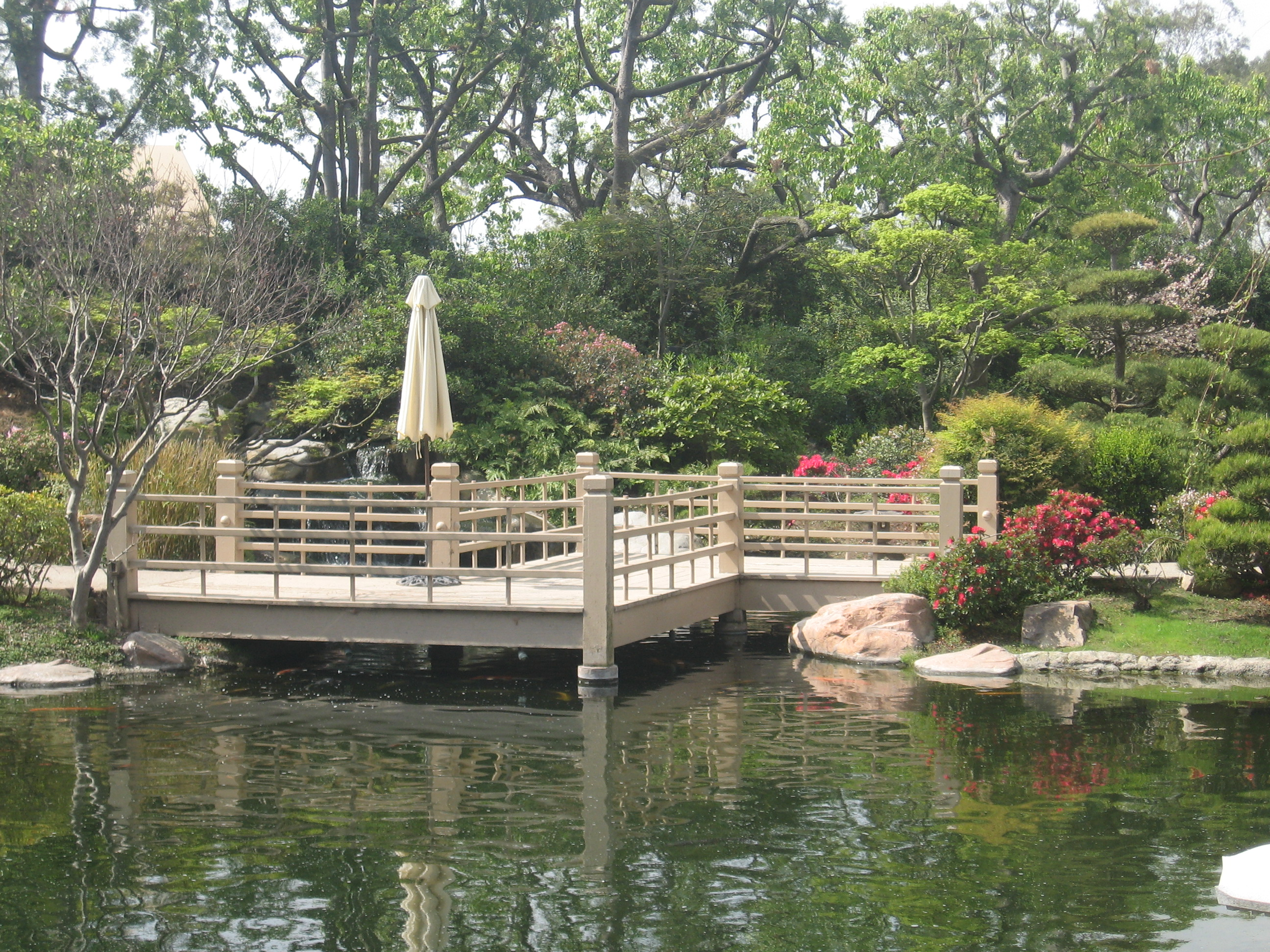 EBM Japanese Garden Zig-Zag Bridge